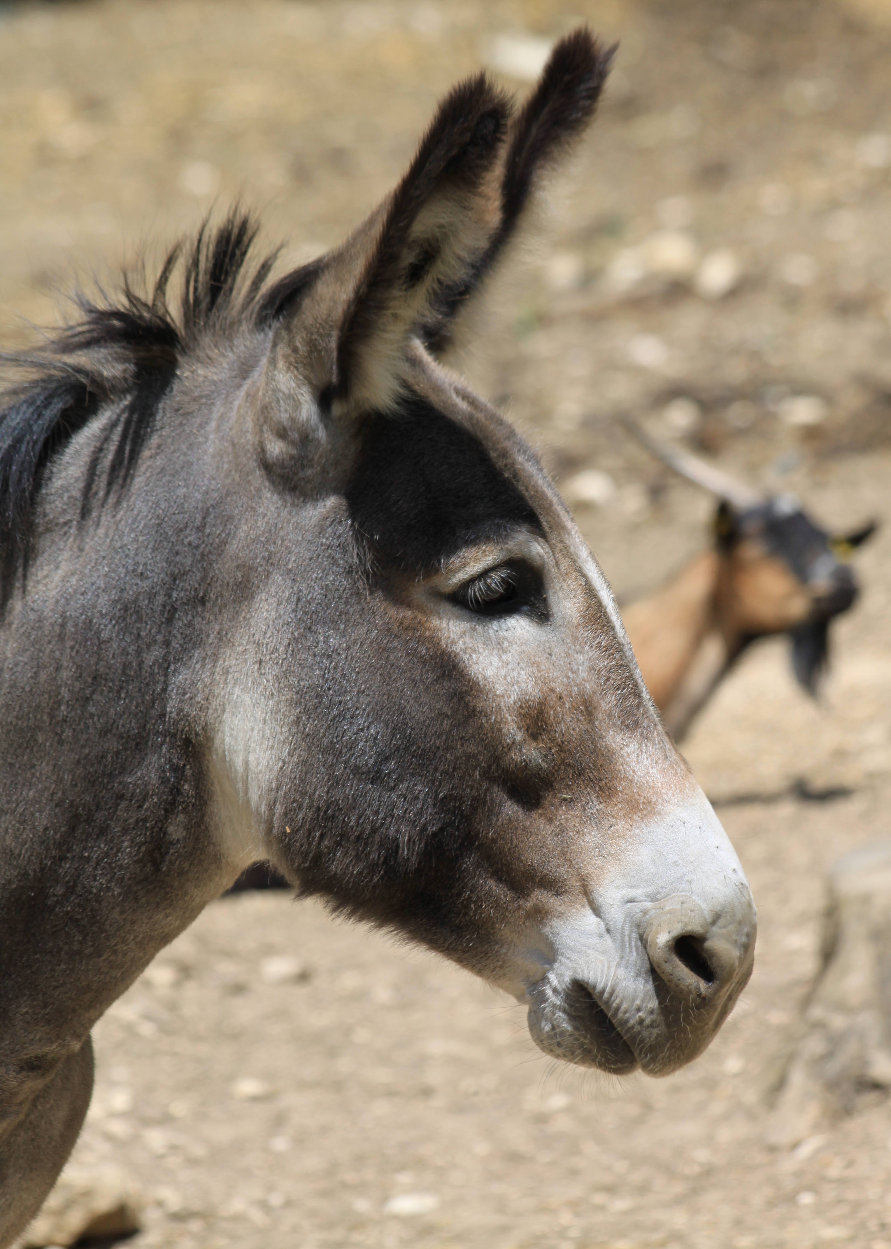 Portrait eines Hausesels (Equus asinus asinus)